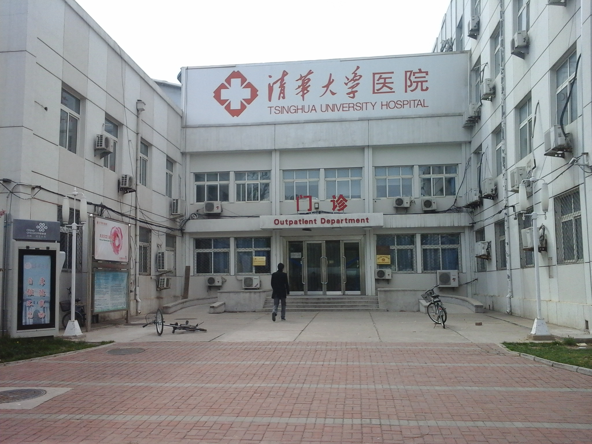 中文（台灣）: 北京清華大學的校醫院